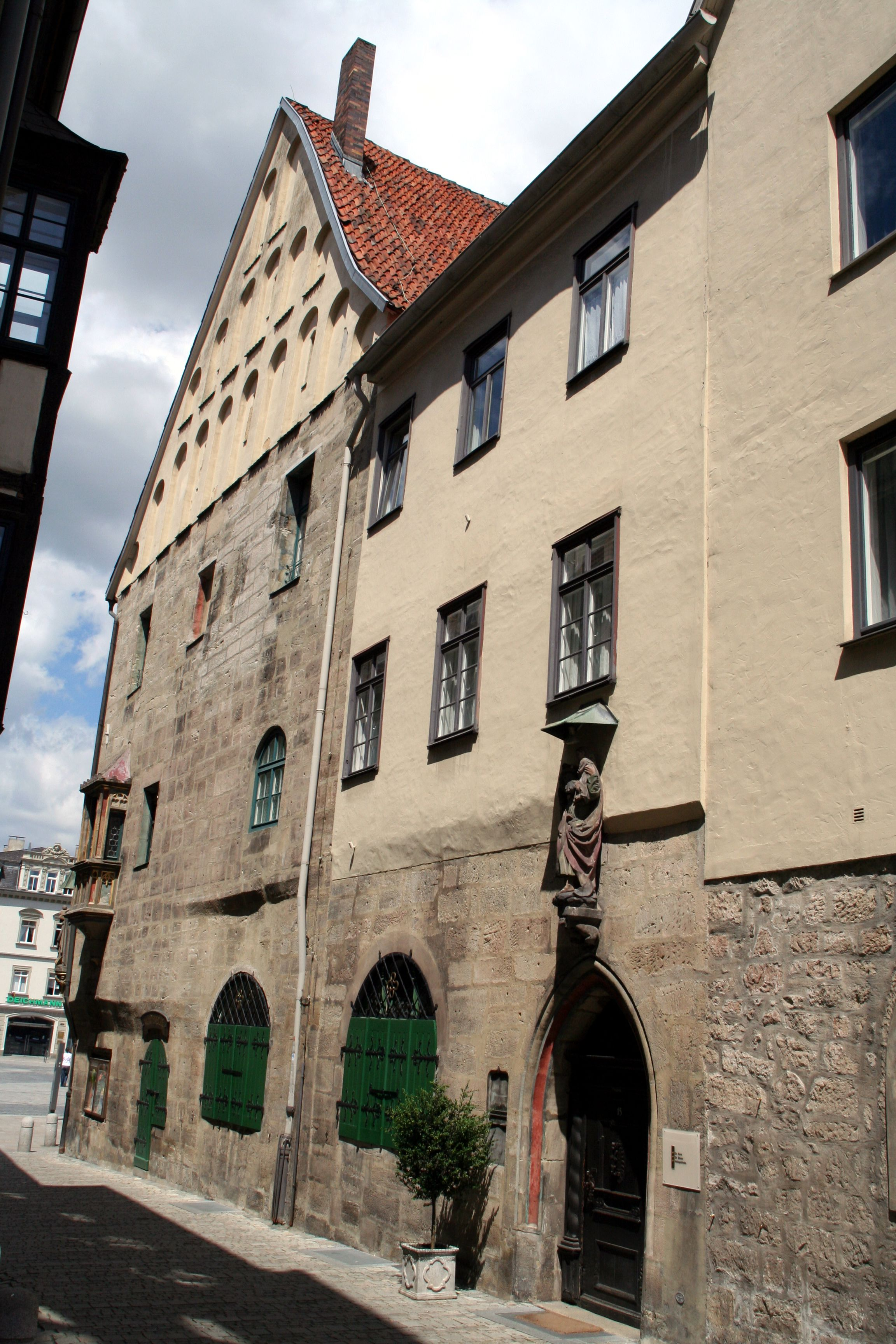 Hofapotheke, am Markt 15 in Coburg; Fassade Steingasse